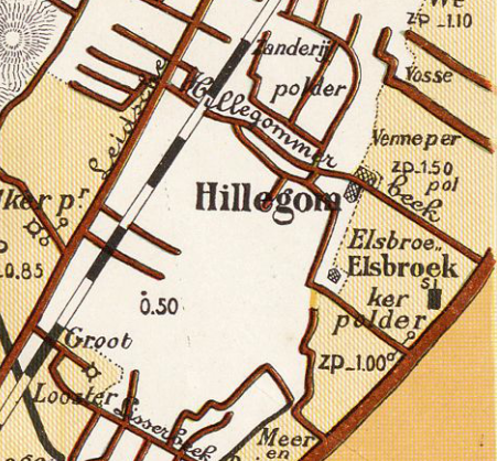 Elsbroekerpolder